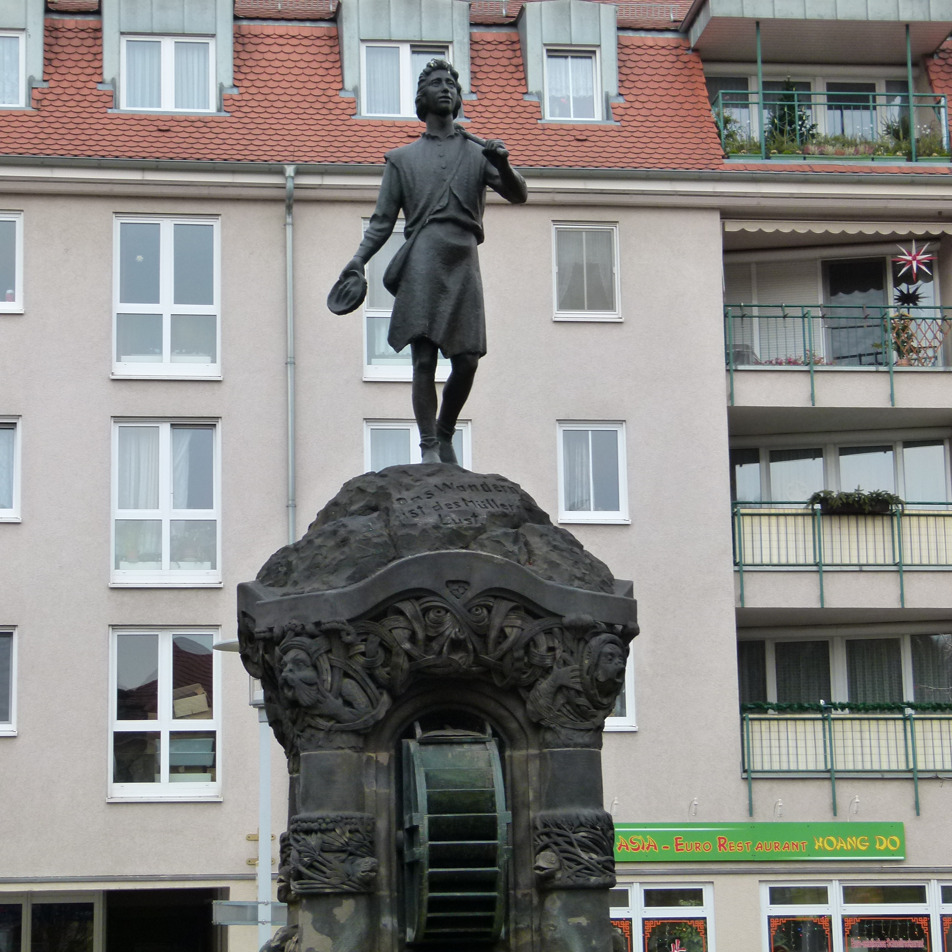 Müllerbrunnen, F.-C.-Weiskopf-Platz, Plauen, Dresden